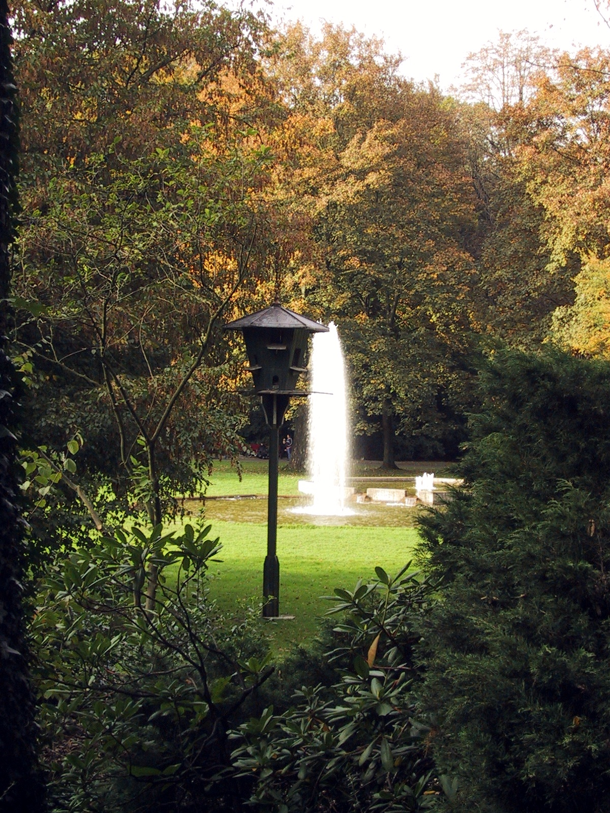 Fontäne im Stadtpark Wattenscheid Source: own work Date: Autum 2002, Bochum-Wattenscheid, Germany Author: Maschinenjunge Licence: GFDL, cc-by 3.0